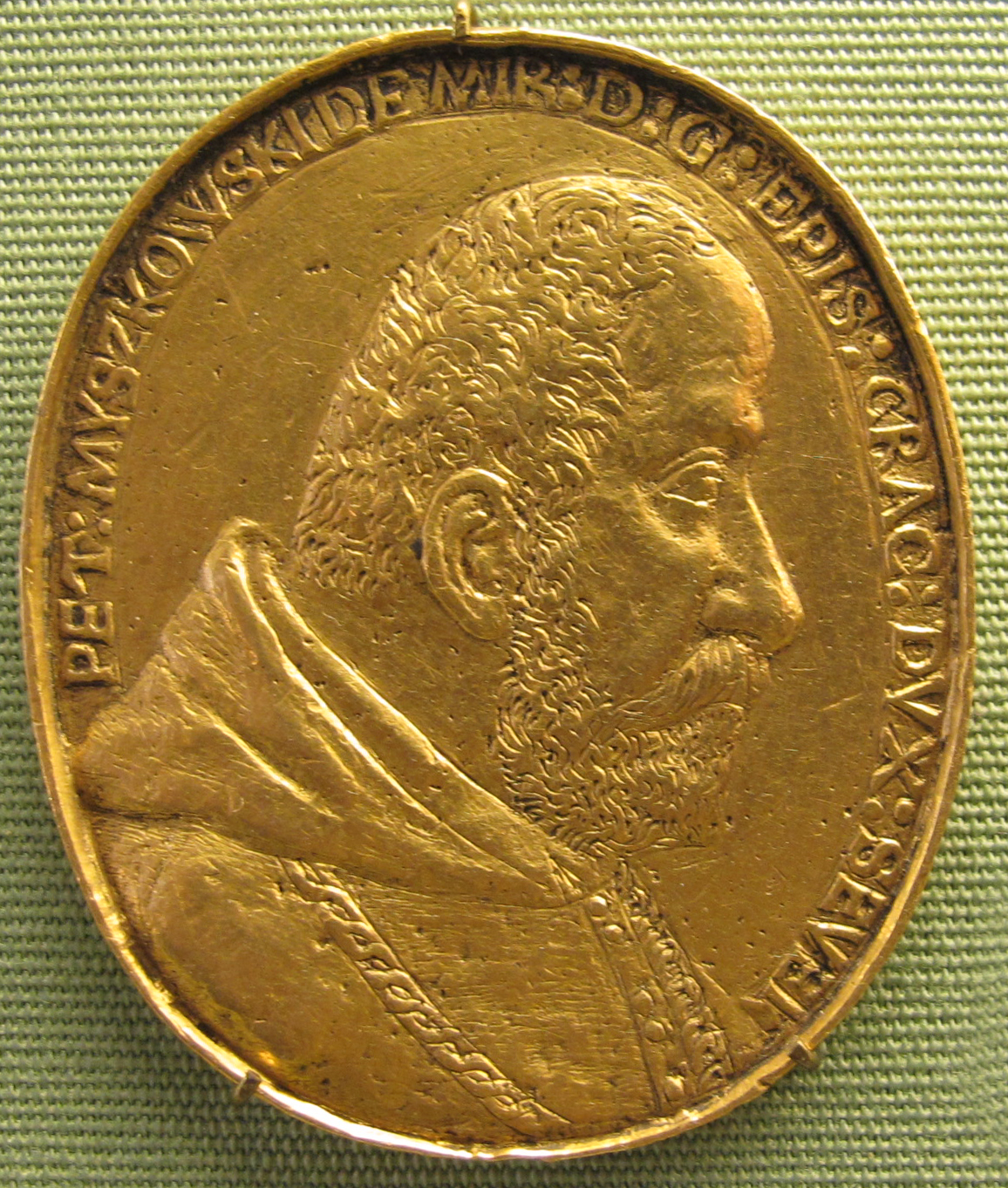 Ignoto, peter myszkowski, vescovo di cracovia, arg, 1620-30